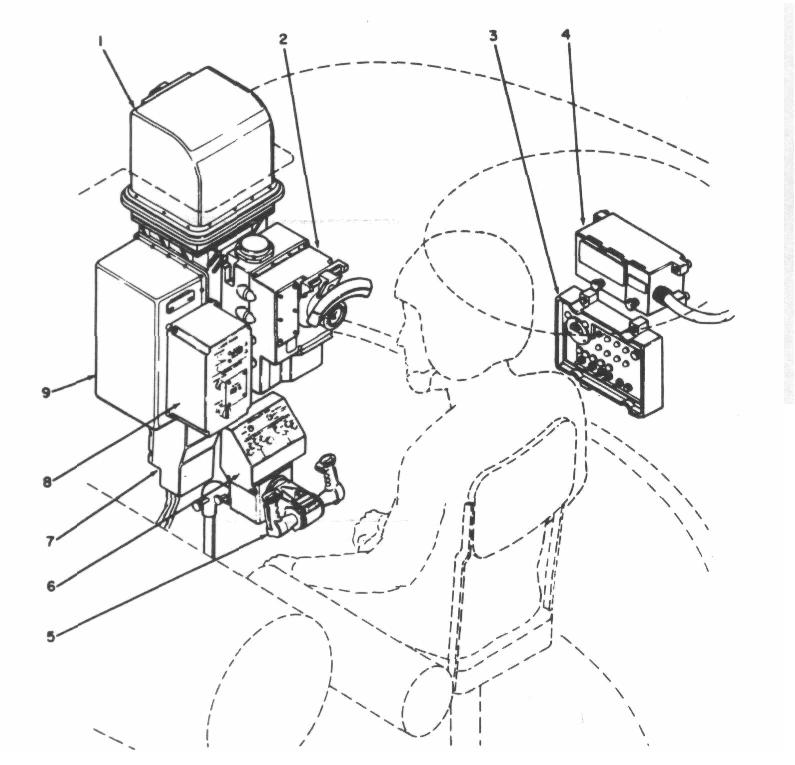 MBT-70 gunner station.